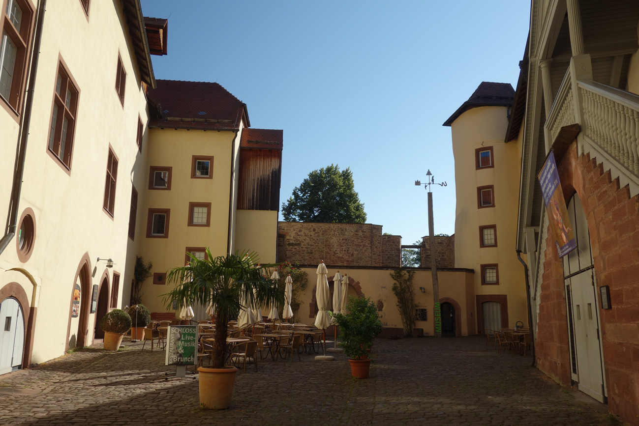 Schlossinnenhof